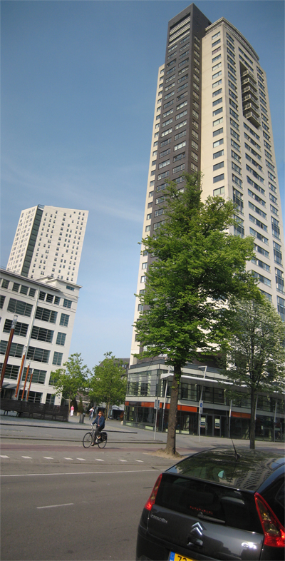 De Admirant & Regent